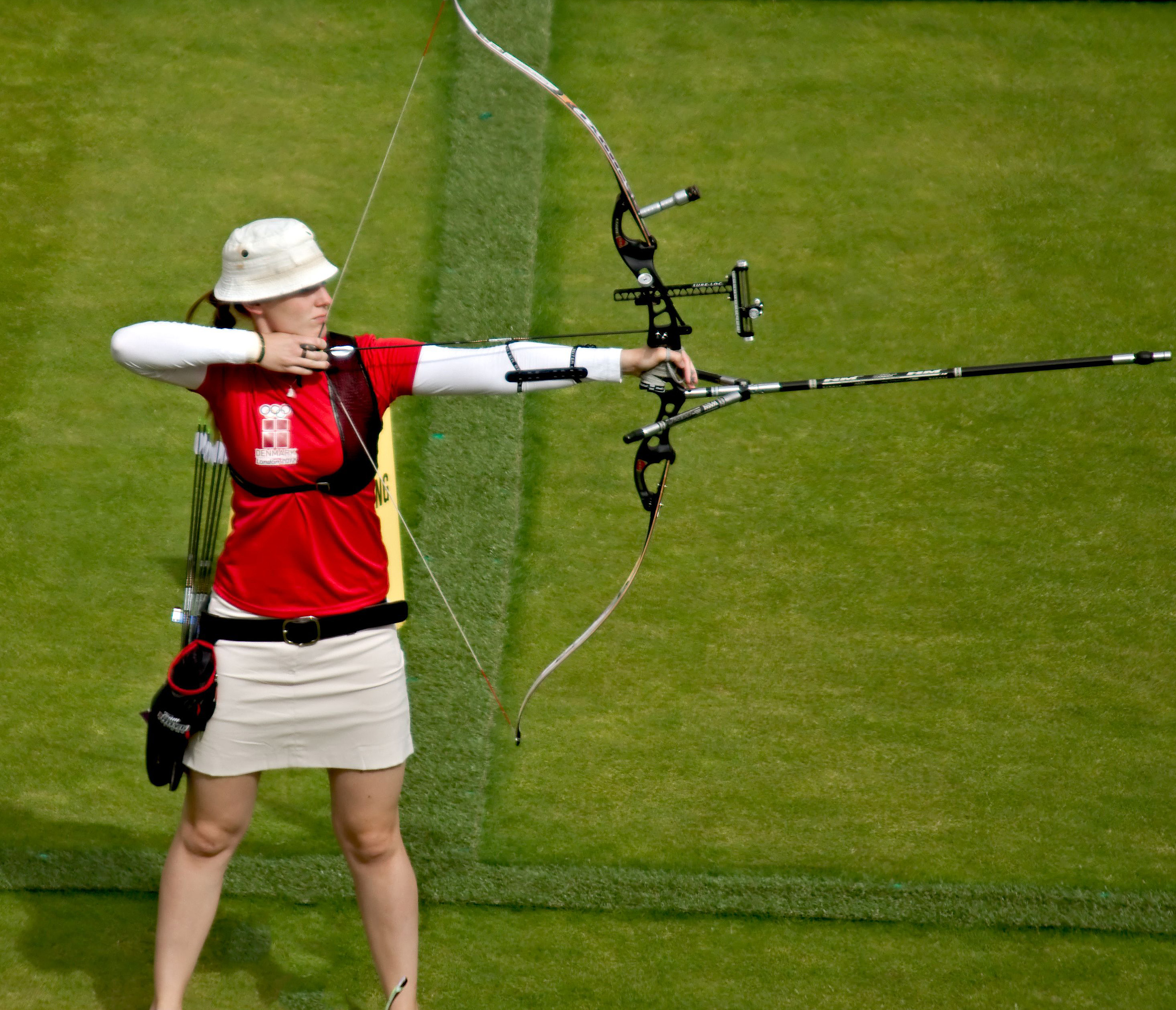 Bueskytten Carina Christiansen under OL i London, 2012